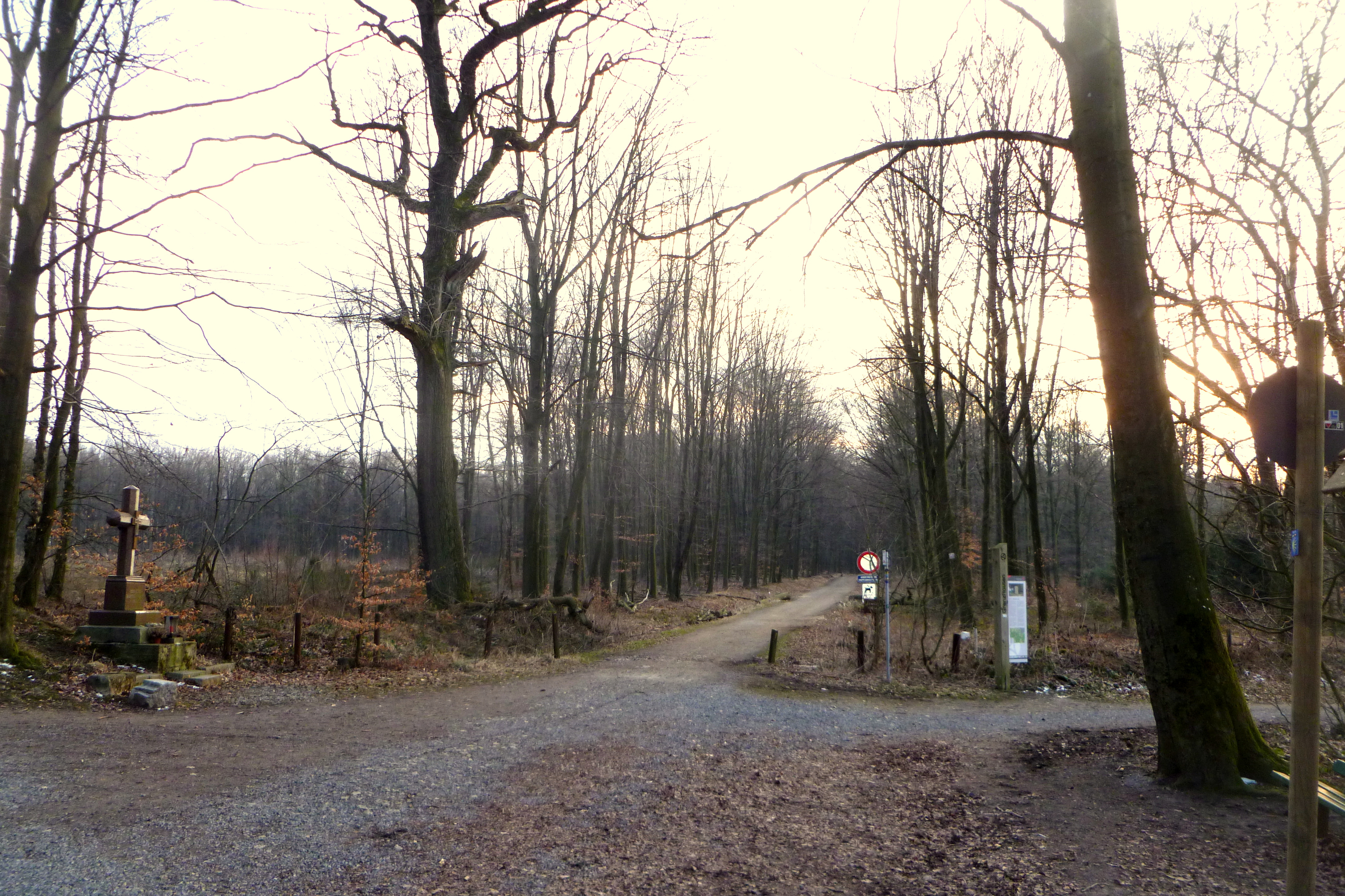 Pilgerweg Aachen-Moresnet Nähe Grenzübergang, Teil des Jakobweges